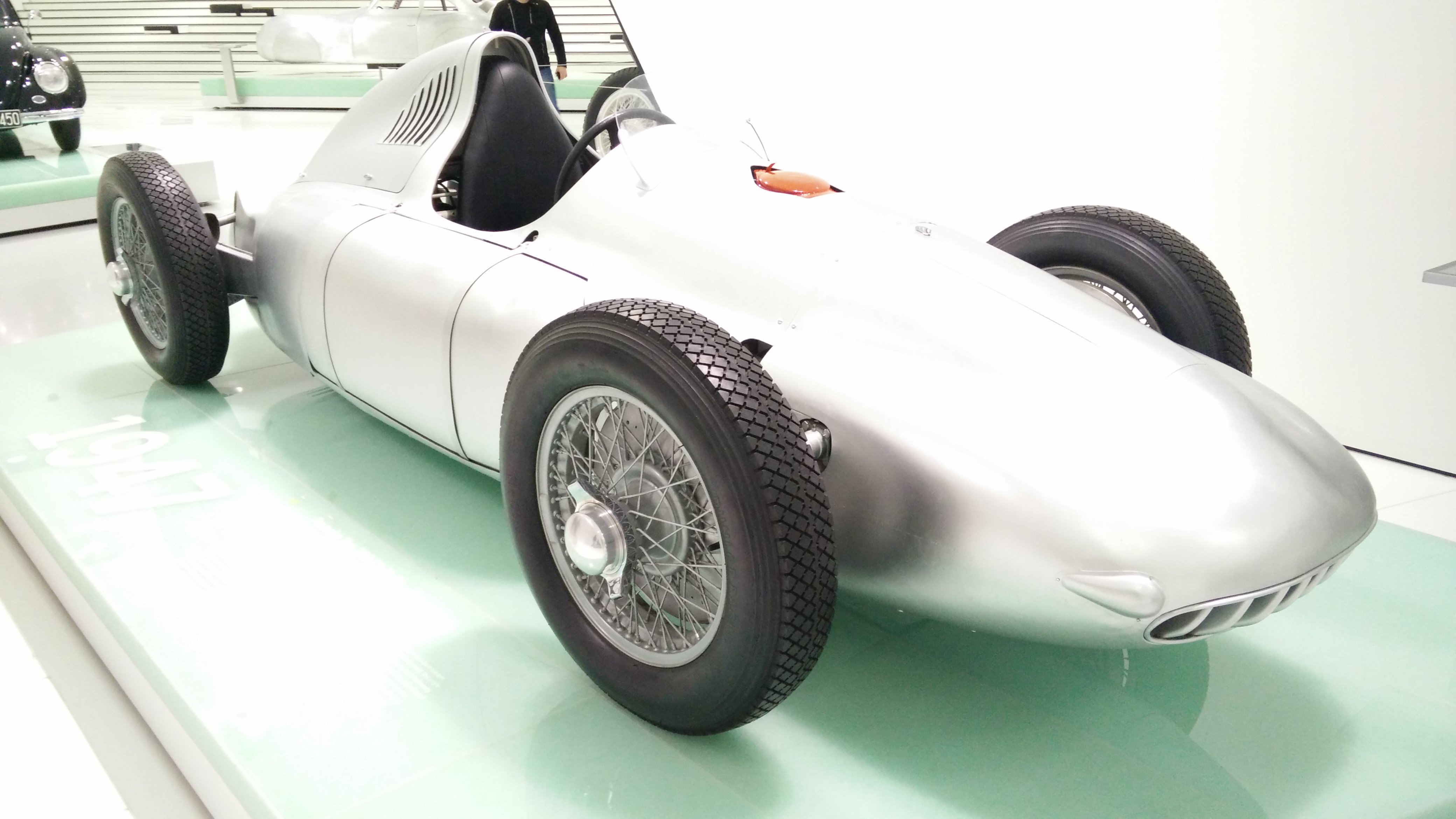 IMG_20141112_111655